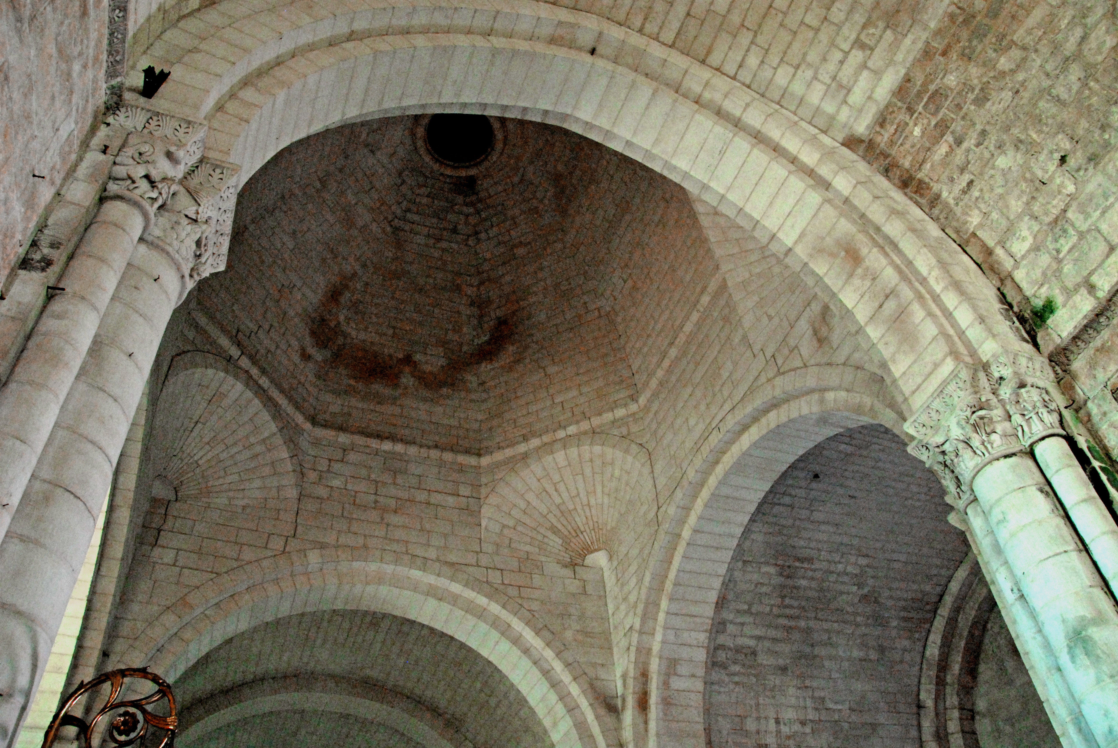 Vouvant, Vierungskuppel